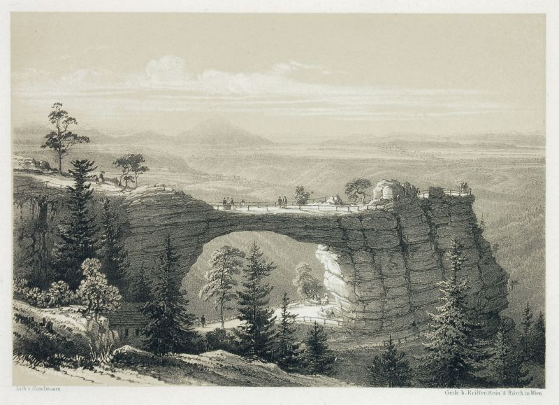 Prebischtor - Lithographieserie über das Elbsandsteingebirge und das Elbetal